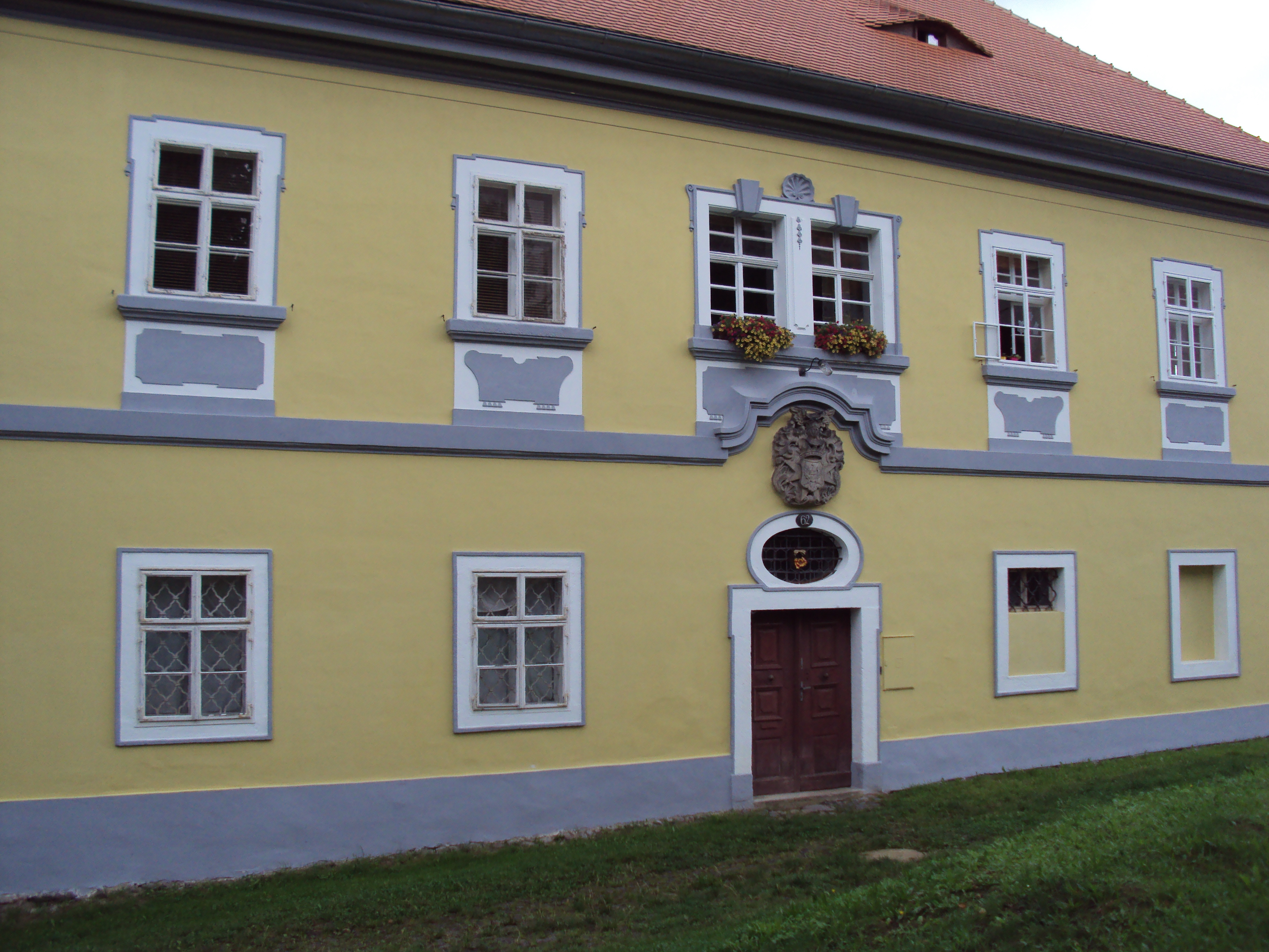 Fara u kostela sv. Jakuba v Horní Libchavě